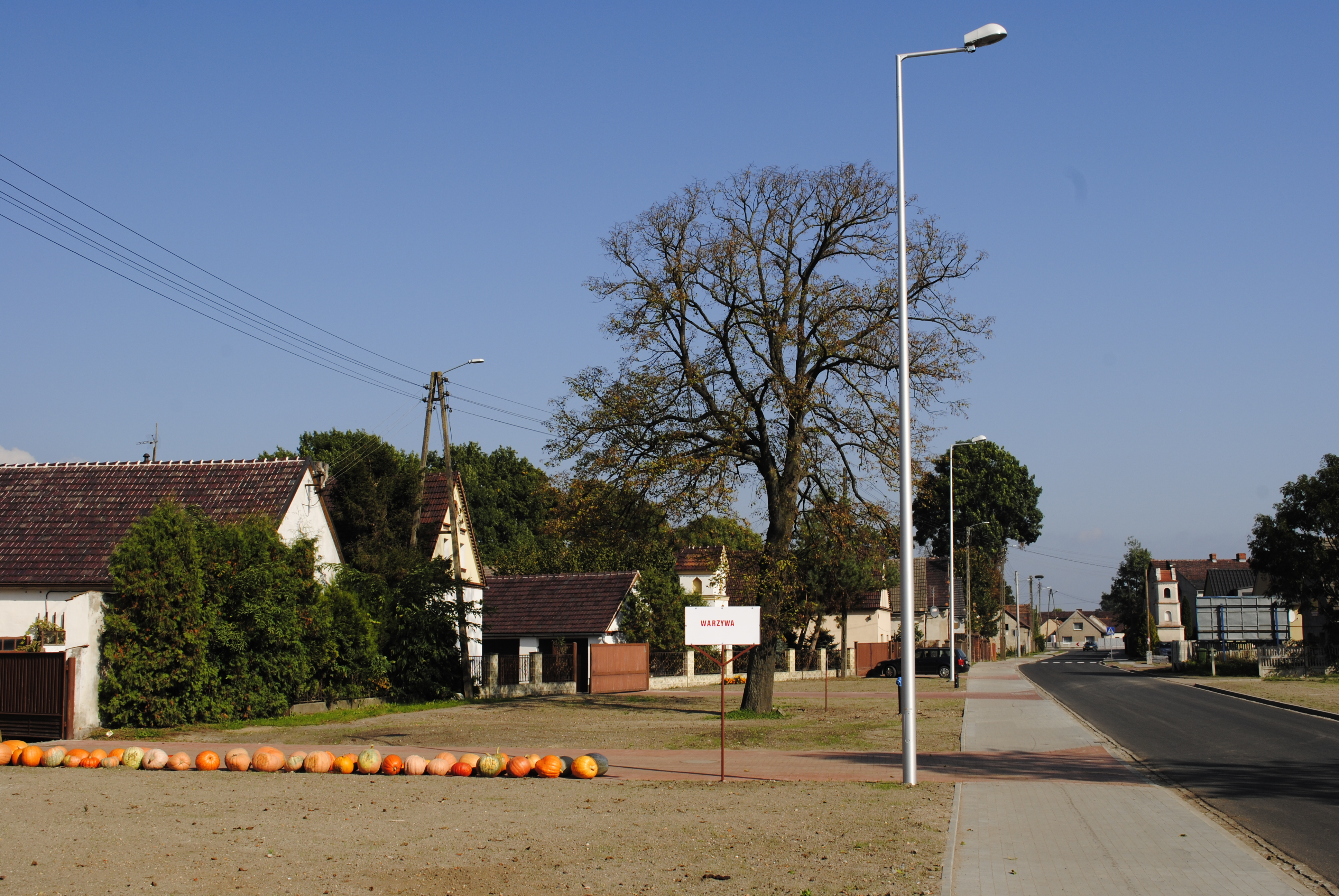 Das Dorf Kepa (dt. Kempa bzw. 1936-1945 Mühlenbach O.S.) liegt nördlich der Stadt Opole